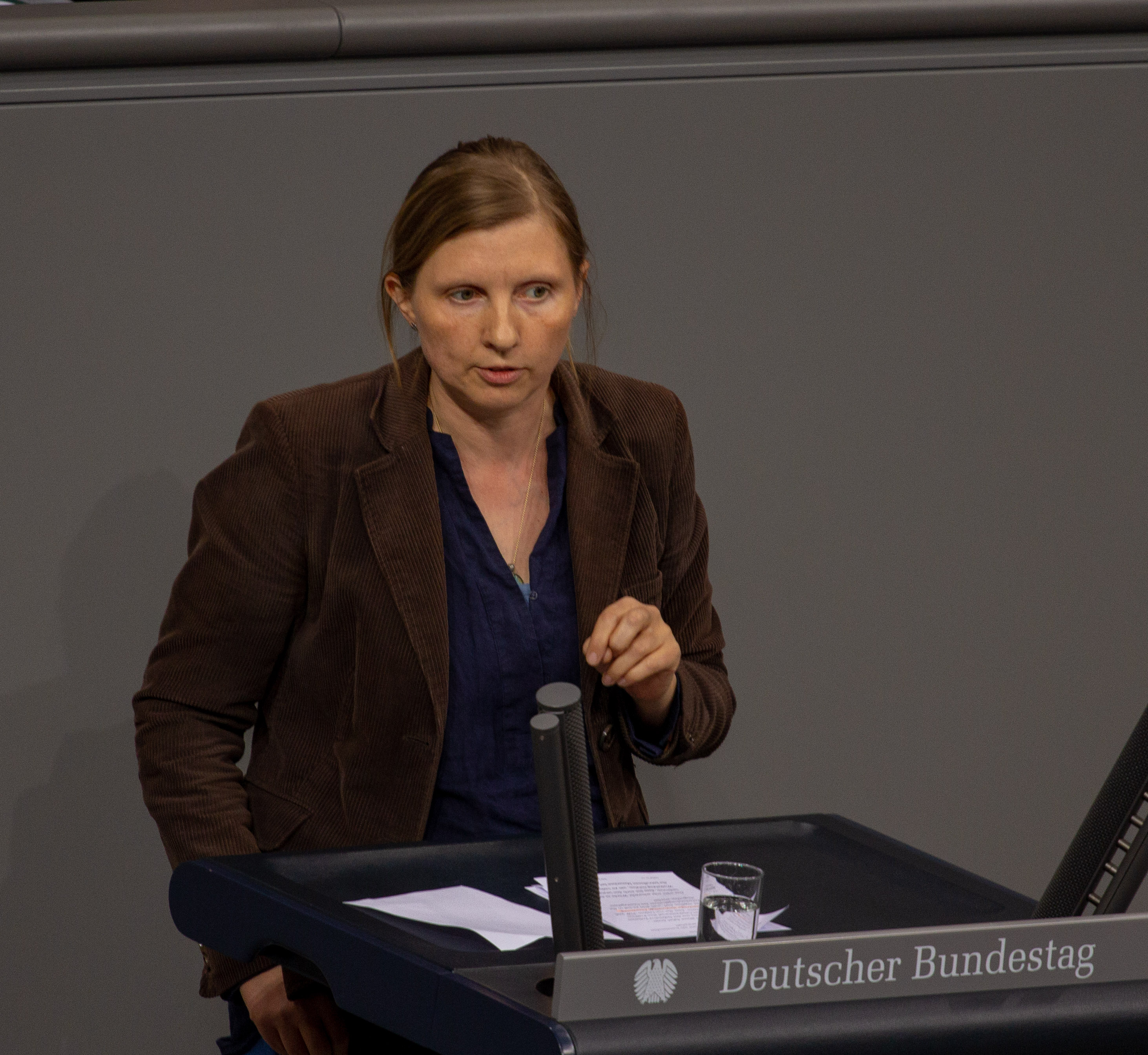 Corinna Rüffer, Mitglied des Deutschen Bundestages, während einer Plenarsitzung am 11. April 2019 in Berlin.